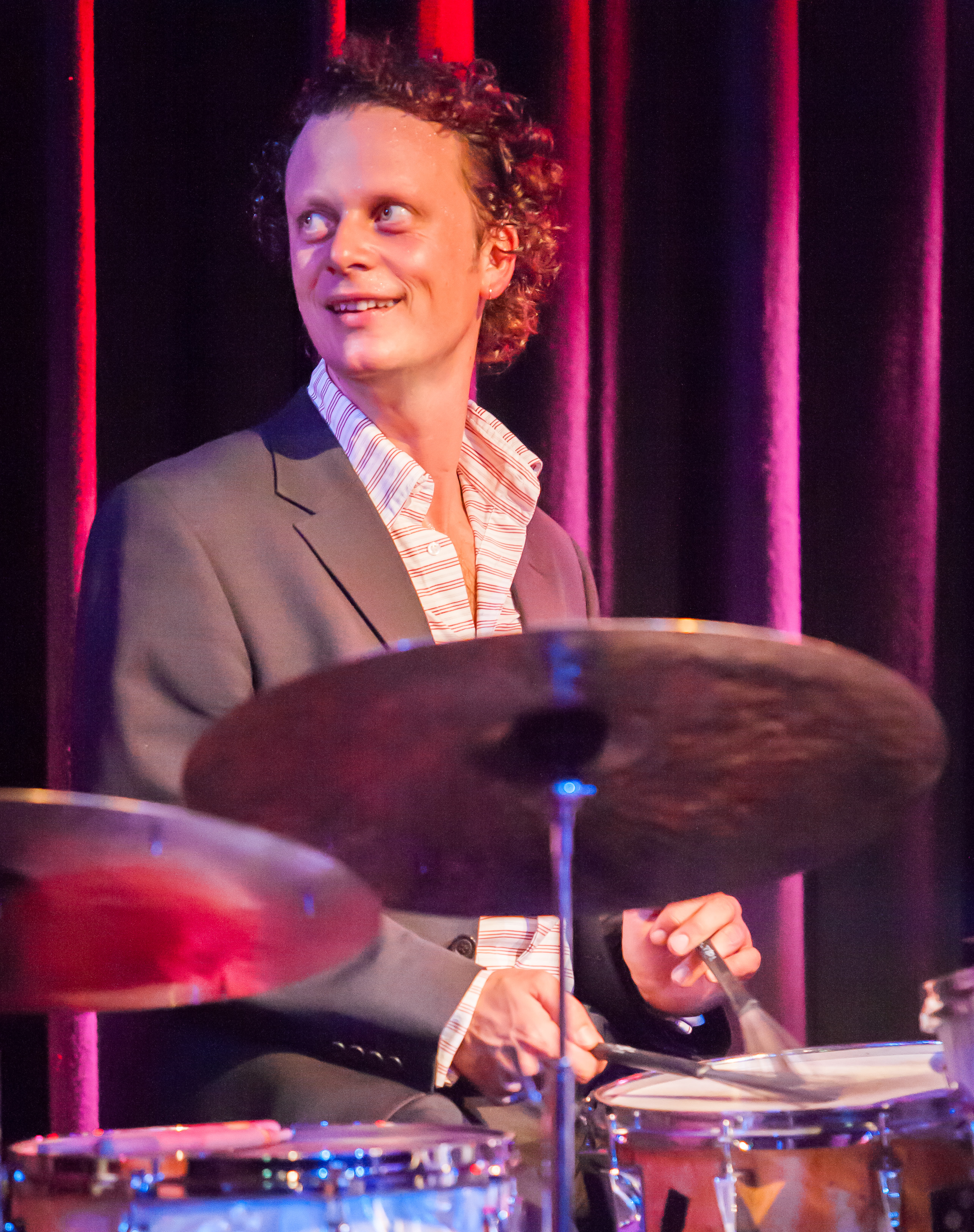 Wim de Vries mit dem Marcus Schinkel Trio in der Harmonie (Bonn)